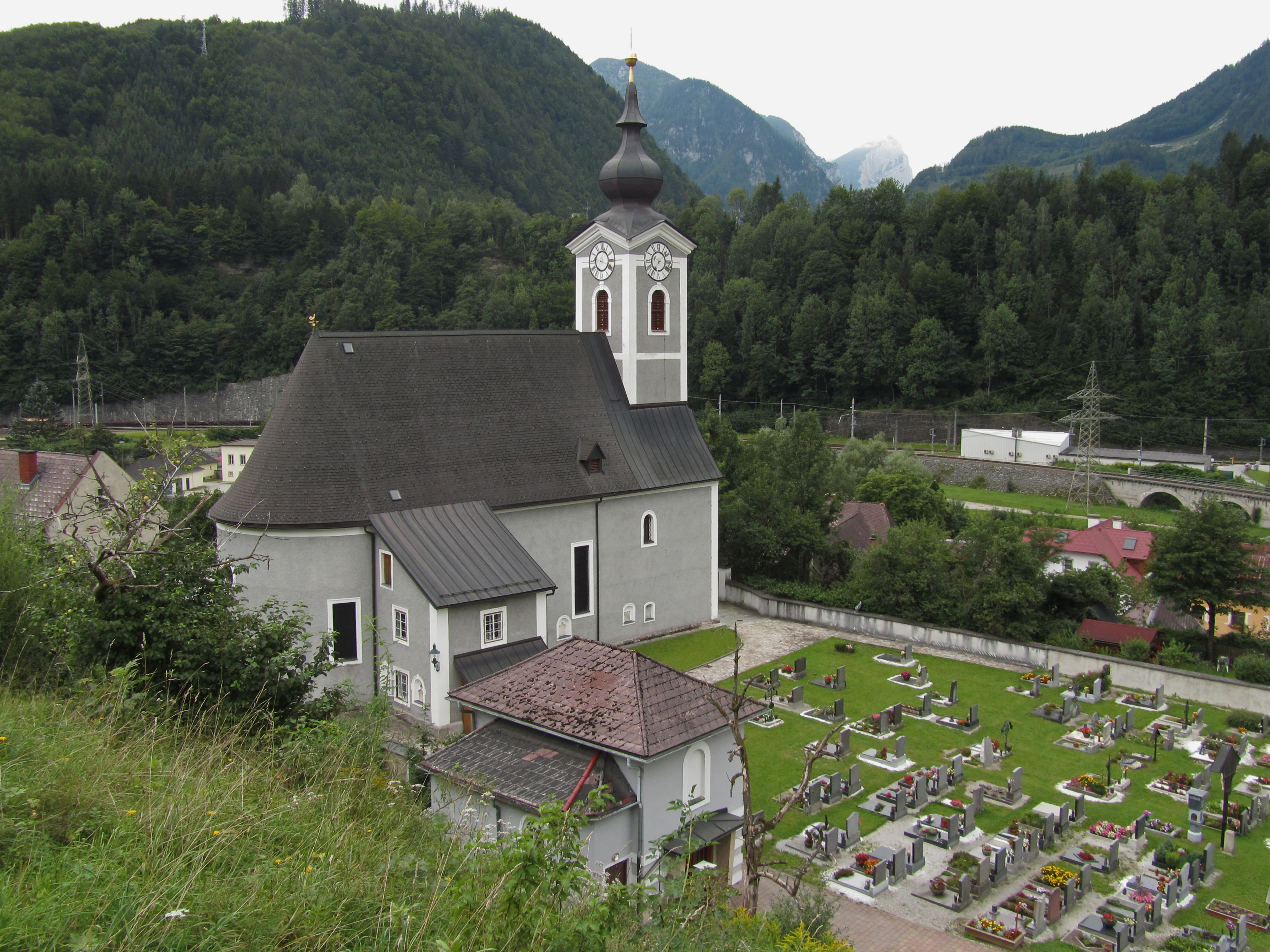 Die Pfarrkirche hl. Johannes der Täufer wurde vor 1545 erbaut, 1616 geweiht und 1747 neu gebaut. Hieflau ist eine eigenständige Pfarre seit 1748, davor war sie eine Filiale von Eisenerz. Der Bau ist vierjochig mit Halbkreisschluss, innen Stichkappengewölbe auf Gurten. Die dreiachsige Westempore ruht auf Pfeilern und der Mittelteil schwingt nach vorne, die Brüstungsfelder mit klassizistischen Girlanden von Ende des 18. Jahrhunderts. Die Westfassade hat einen Giebel, Nischen und Schmiedeeisengitter aus dem Ende des 18. Jahrhunderts, die Tür ziert reiches Barockornament. Fassadenturm mit Zwiebelhelm.